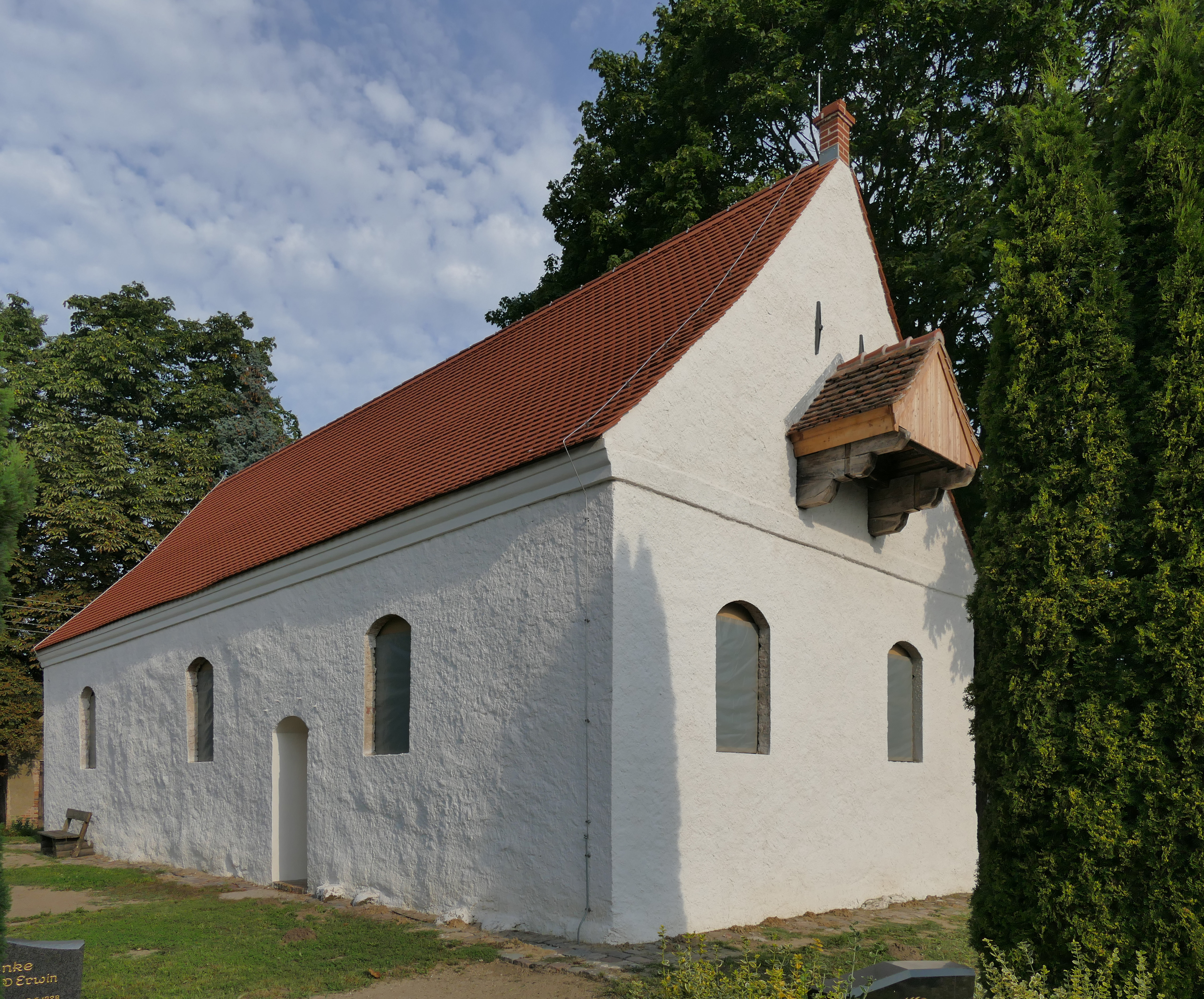 Kirche in Pelsin, Südseite und Ostgiebel